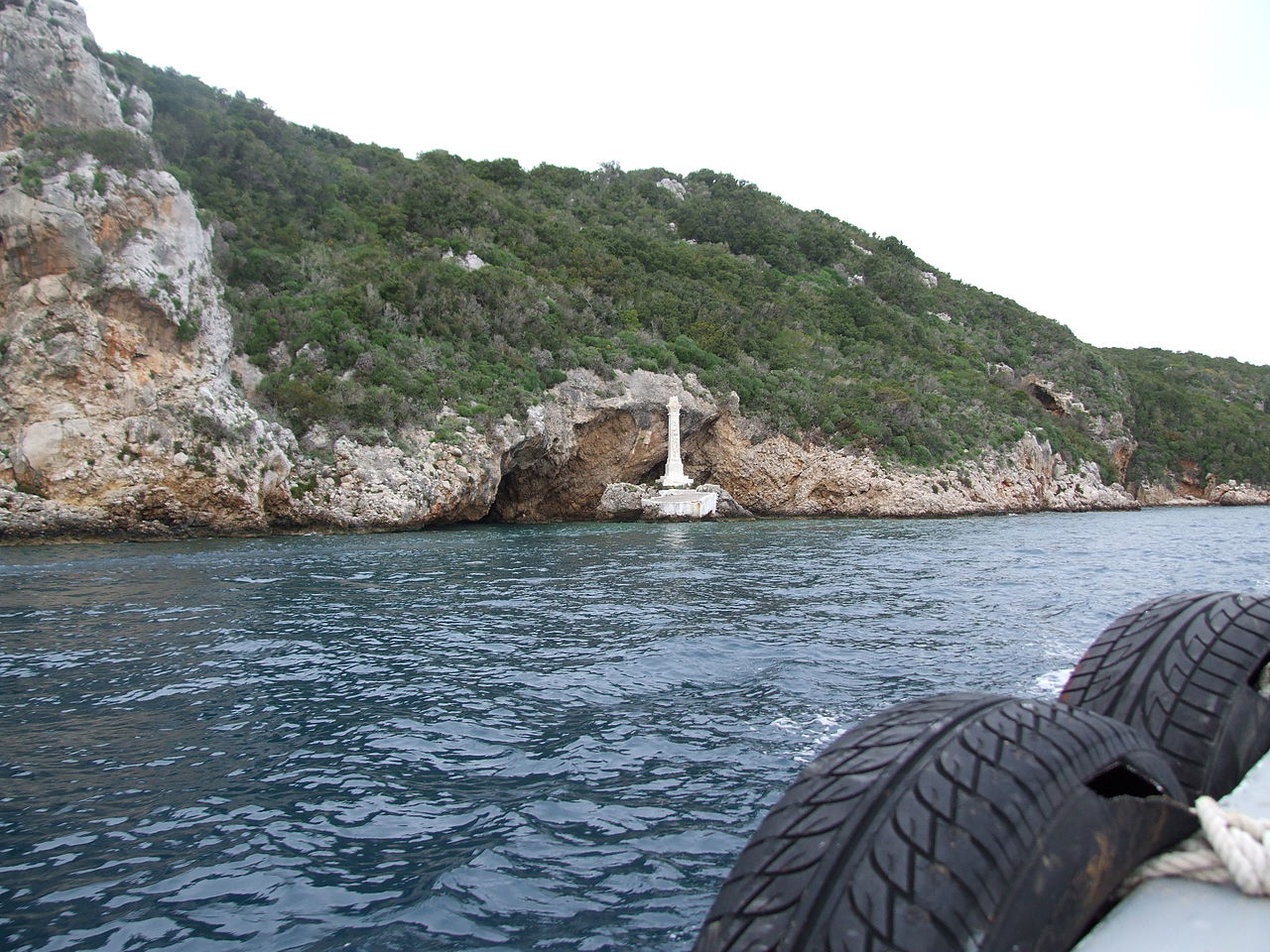 Monument de Santa Rosa sur Sphactérie